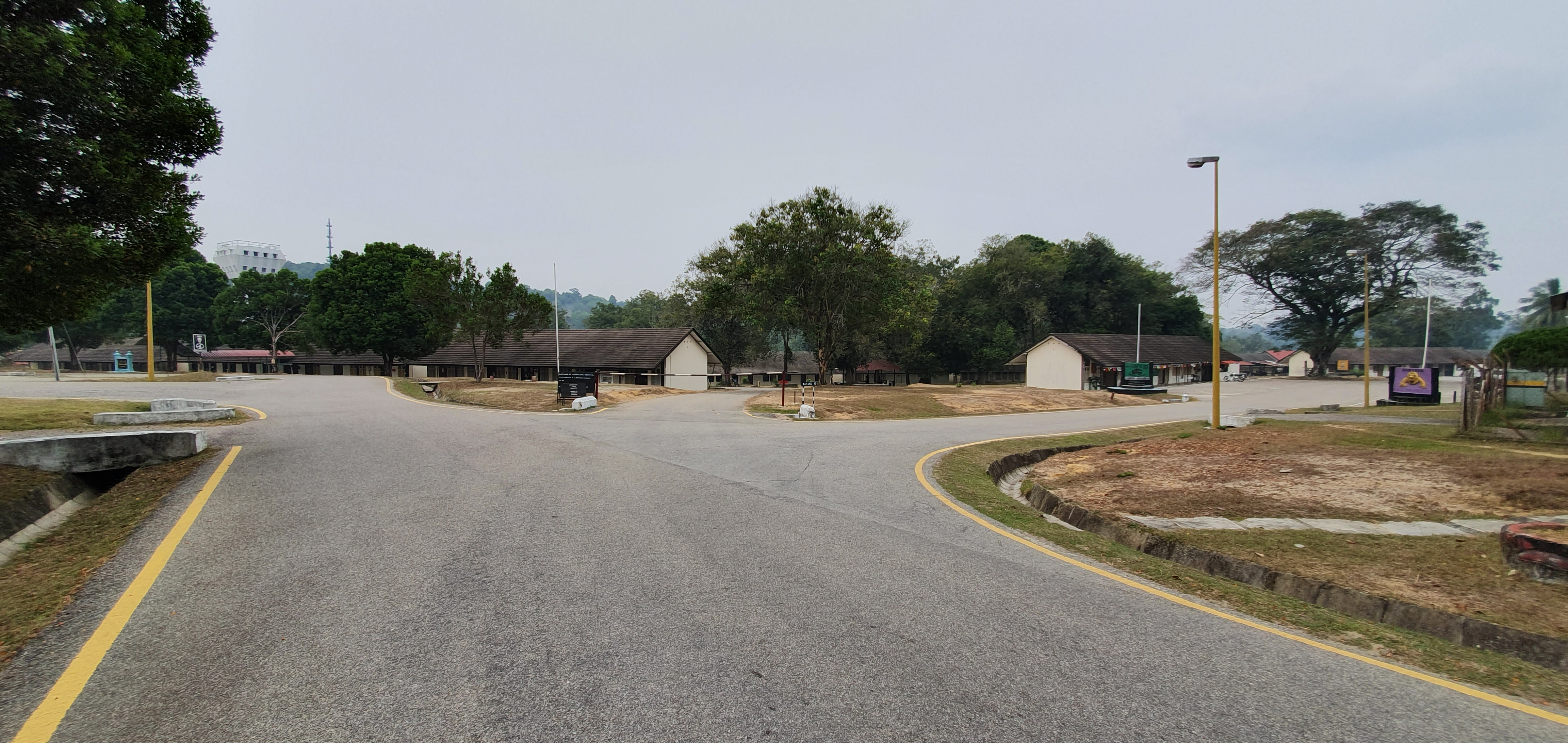 Jalan menuju ke komp line